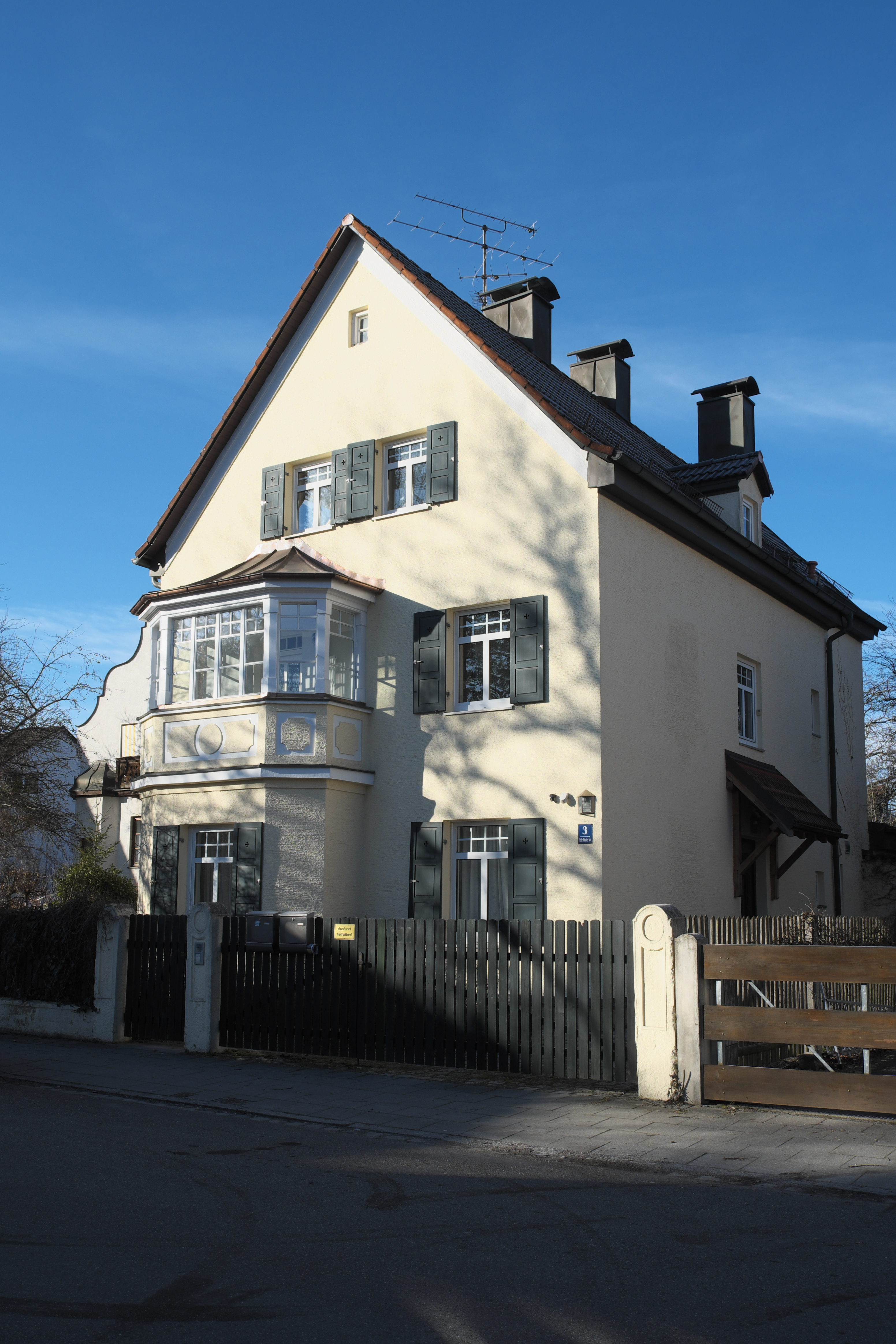 Wohnhaus, Fritz-Reuter-Straße 3 (München), in Pasing im Stadtbezirk Pasing-Obermenzing in München (Bayern/Deutschland)